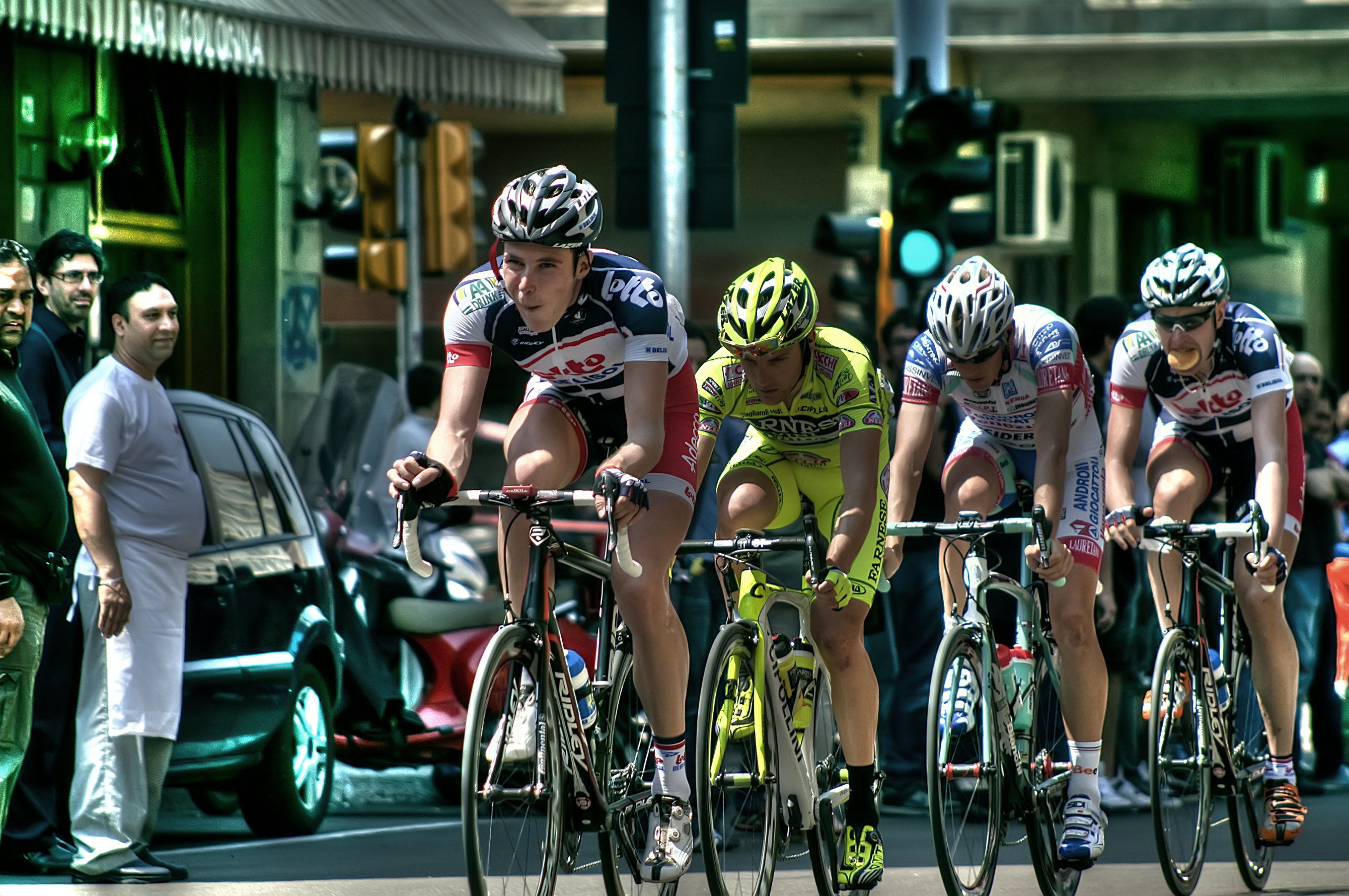 I Fuggitivi: - Brian Bulgac - De Negri - De Marchi - Oliver Kaisen